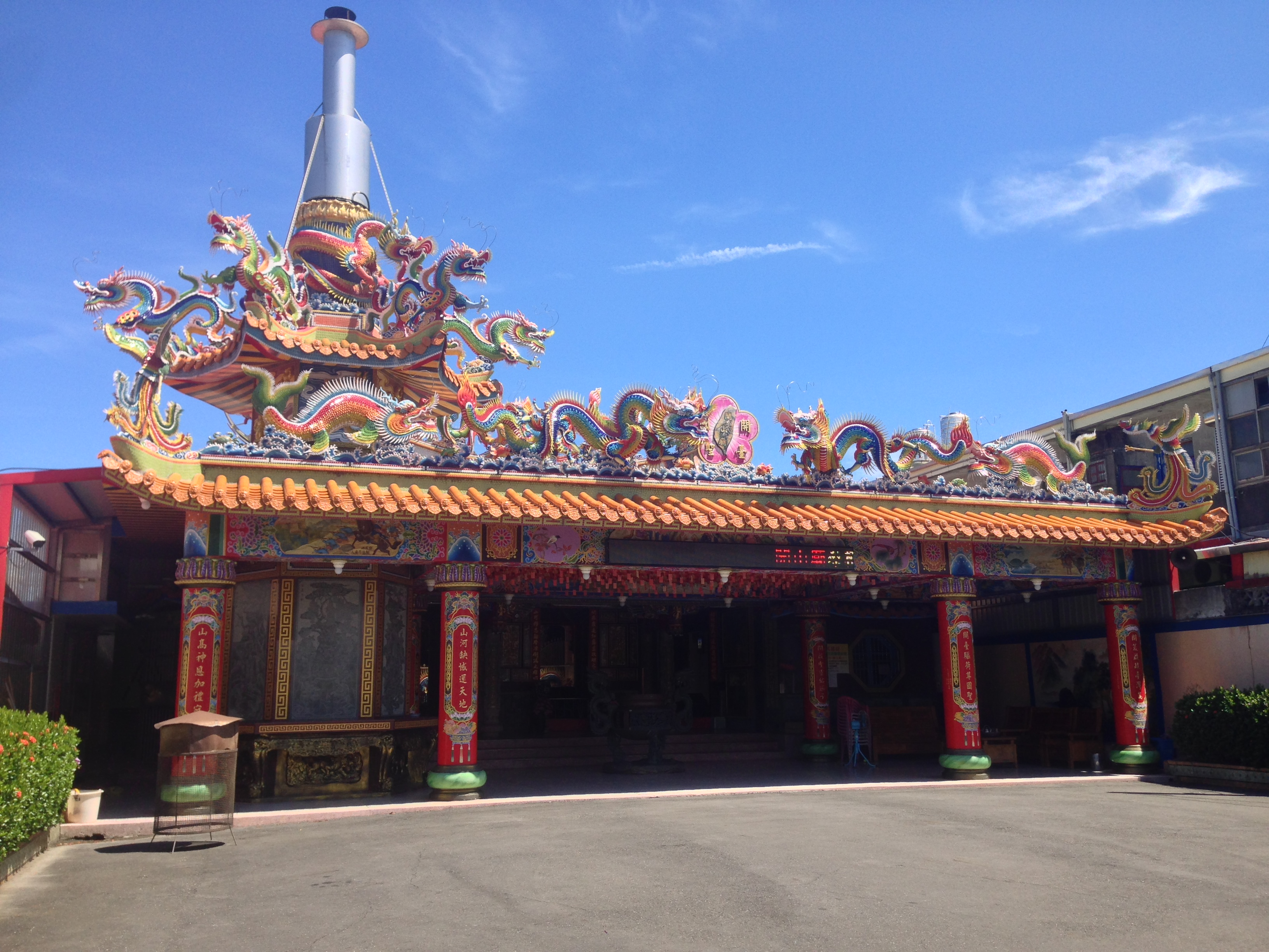 加禮宛開山廟